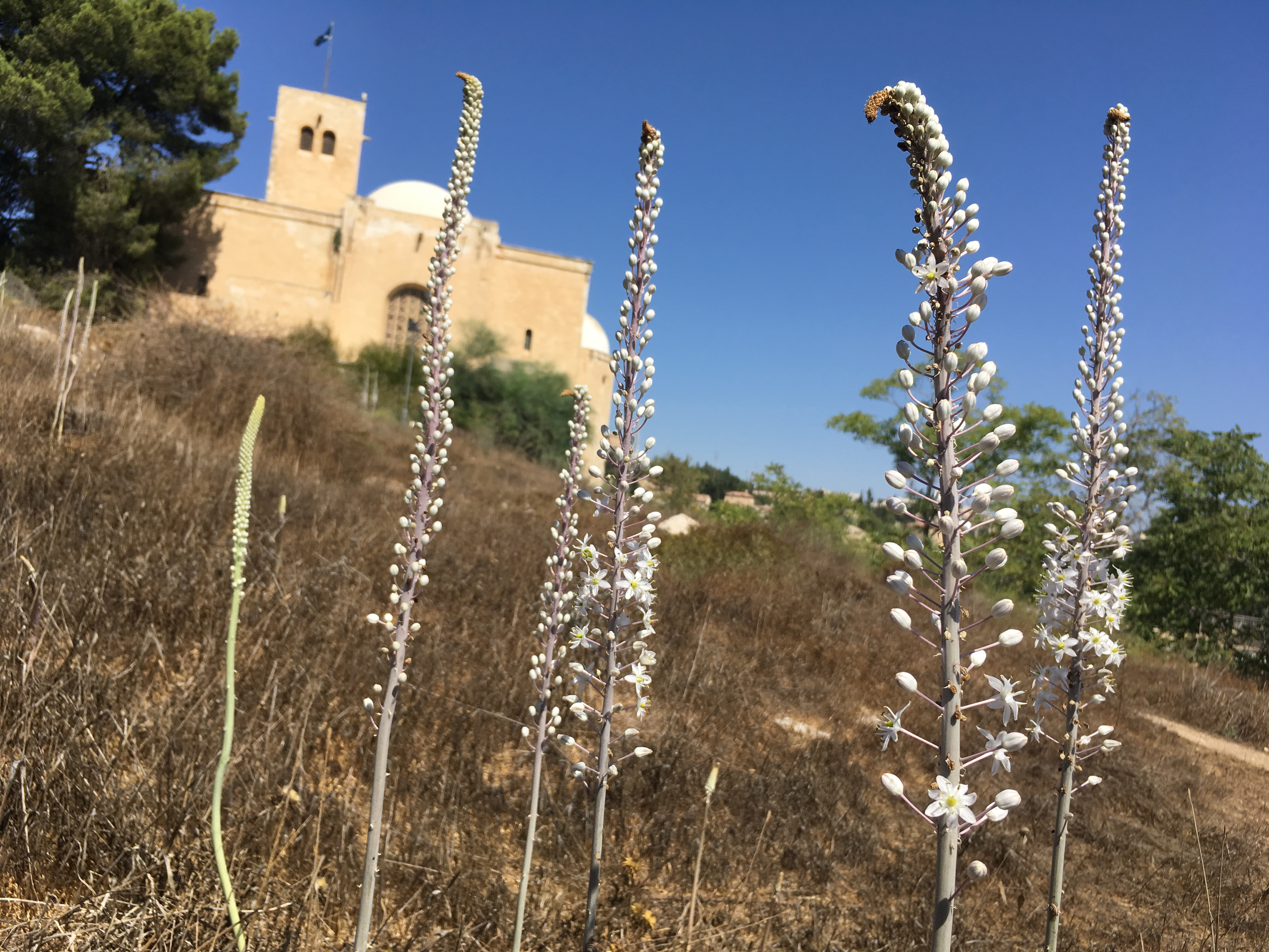 כנסיית סנט אנדרוז נמצאת על מורדות גבעת התנ"ך. הכנסייה שייכת לכנסייה של סקוטלנד, והיא נבנתה כמונומנט הנצחה לחיילים הסקוטים בצבא בריטי, חללי מלחמת העולם הראשונה.